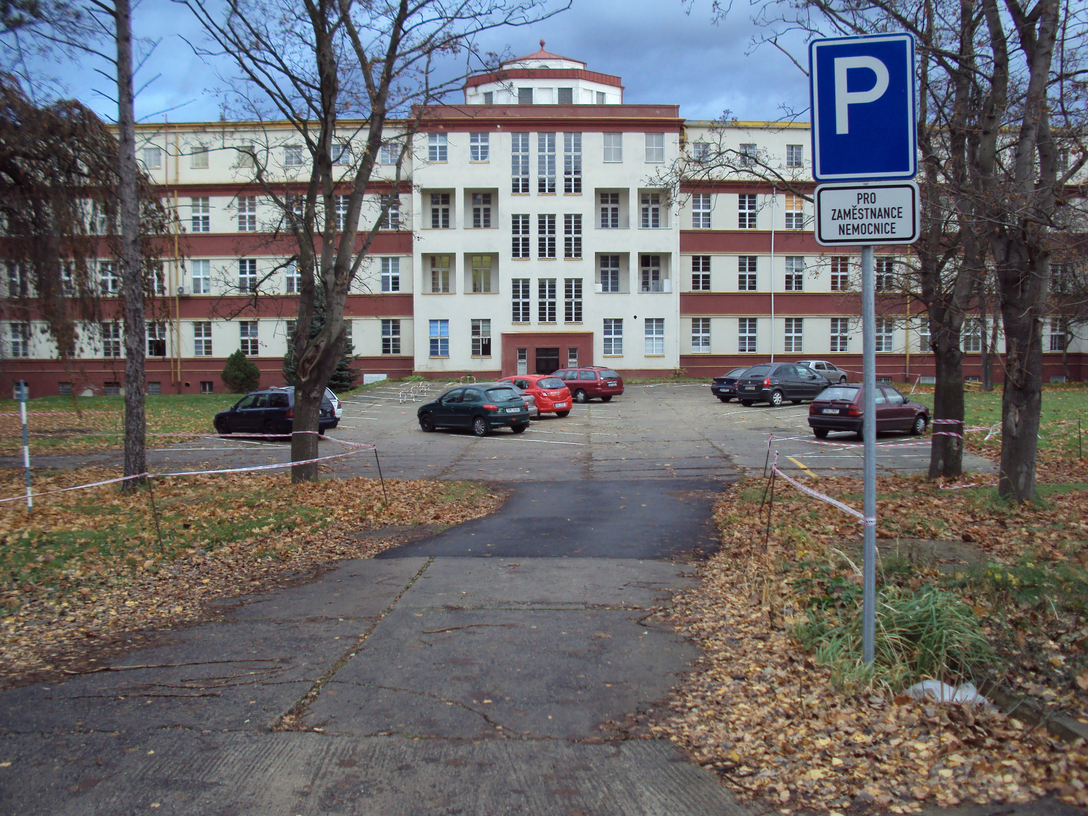 Nemocnice Teplice, zadní trakt